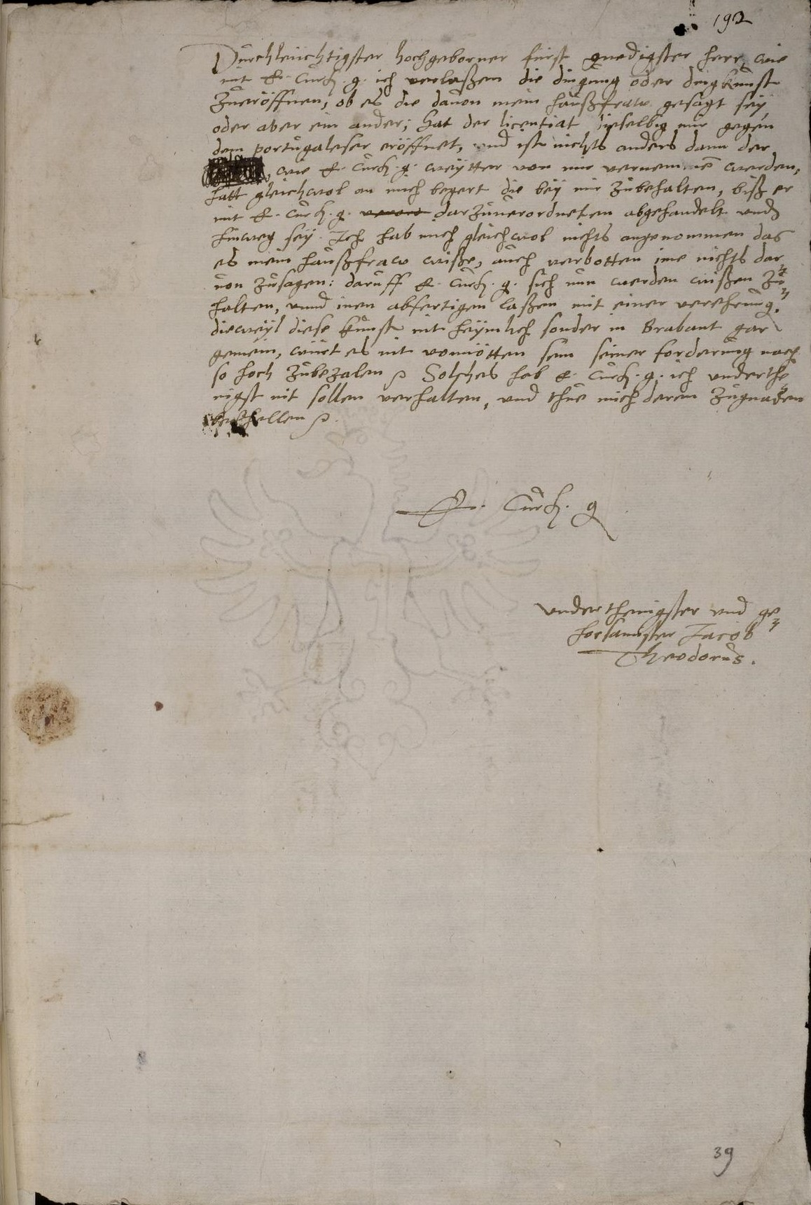 Codex Palatinus germanicus 8, Blatt 39r der Handschrift: Brief des Botanikers Jakobus Theodorus aus Bergzabern (Tabernaemontanus) an Kurfürst Friedrich III. von der Pfalz (Original, 12. Januar 1576)